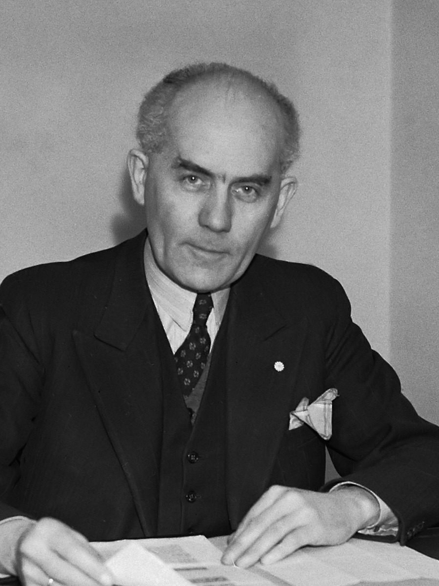 Ir. F.C.M. Wijffels, minister van Sociale Zaken 1945